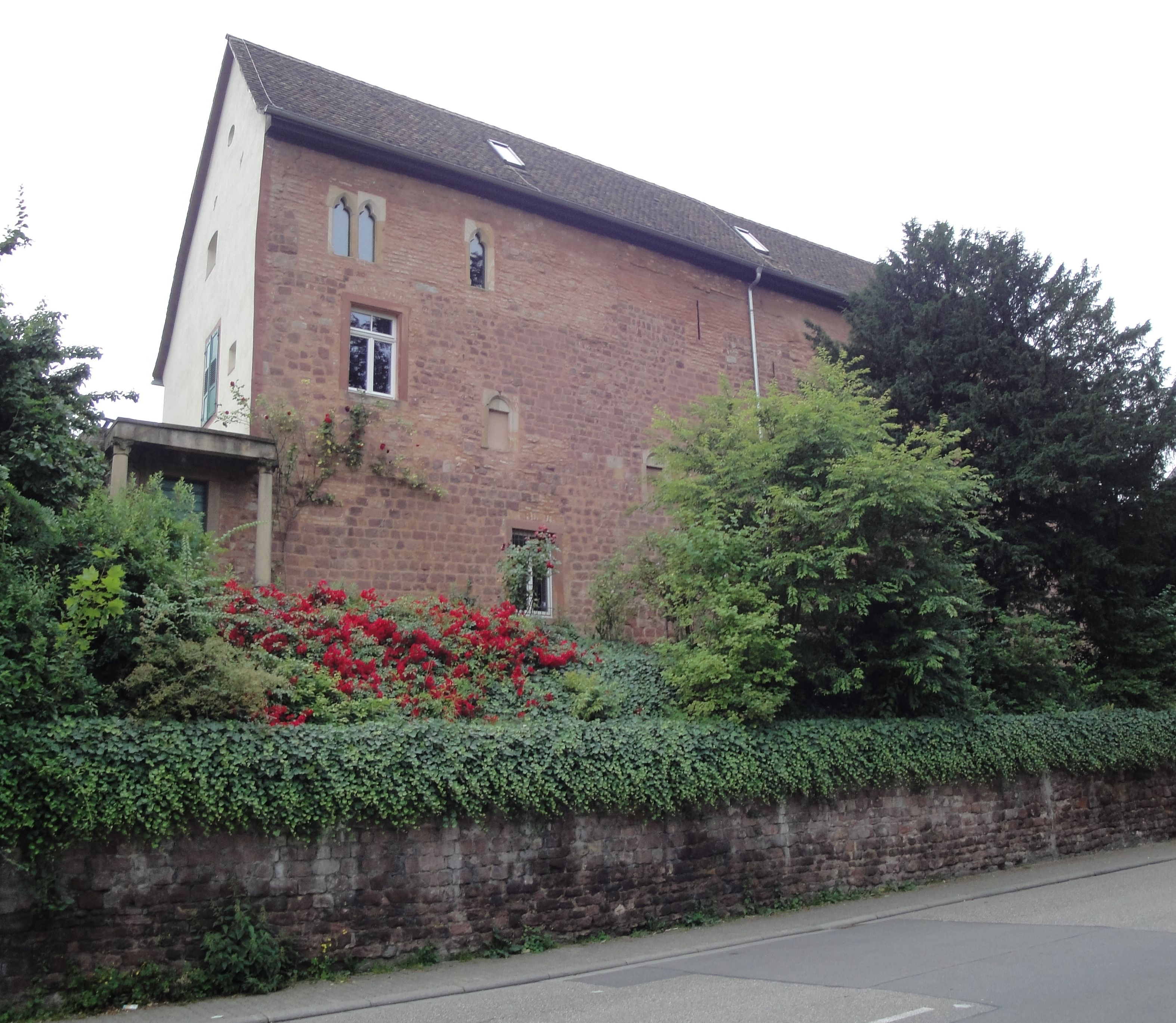 St.-Guido-Str. 19 in Speyer